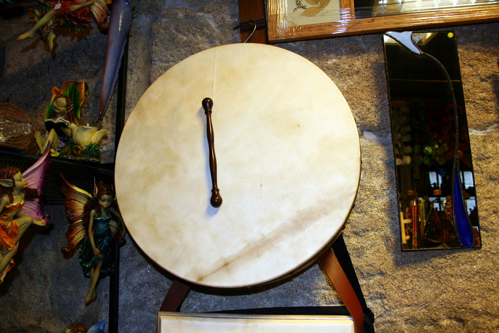 O bodhrán (AFI [ˈbɔːrɑːn] ou [ˈbaʊrɑːn]; plural bodhráin) é un tambor de marco (frame drum) irlandés. O diámetro do marco vai dende os 25 ós 66 centímetros, mentres que a profundidade é de entre 9 e 20 centímetros. O tamano máis habitual emprega un marco de entre 35 e 45 centímetros de diámetro cunha profundidade duns 10 centímetros. A un lado do marco encóntrase unha membrana (ou parche) tensada e clavada ó marco mediante tachuelas. Tradicionalmente a membrana sole ser de pel de cabra, aínda que actualmente é habitual encontrar bodhráin fabricados con peles de outros animais coma o canguro ou incluso materiais sintéticos coma o kevlar. O outro lado do marco queda aberto. Habitualmente, unha ou dous barras cruzadas no interior do marco fortalecen a súa estrutura. Algúns bodhráin modernos para uso profesional empregan tensores mecánicos que permiten variar a tensión do parche, similares ós empregados nos tambores das baterías.